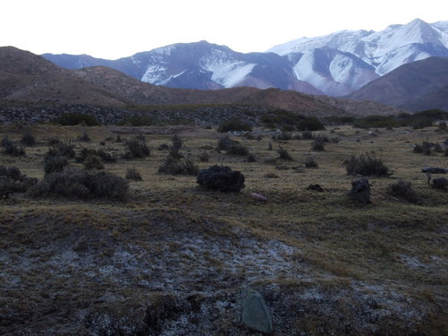 La Cordillera de los Andes desde el paraje de Chita, en el departamento Iglesia, provincia de San Juan, Argentina